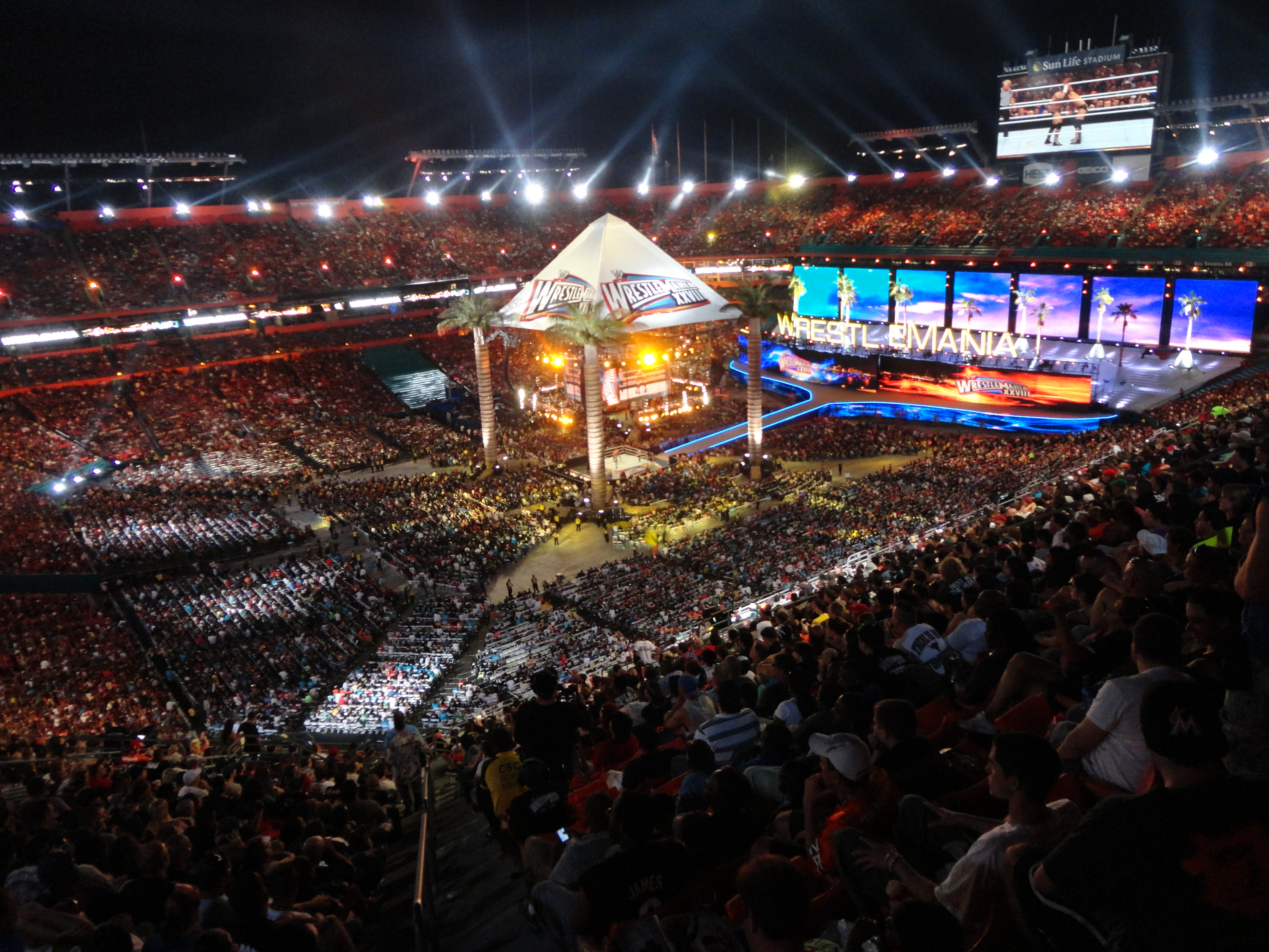 Panorámica del evento Wrestlemania XVIII